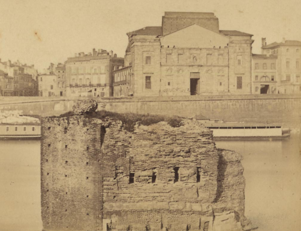 Pilier du vieux pont de la Daurade, au milieu de la Garonne.Août 1869.Vue d'ensemble du pilier prise depuis l'Hôtel-Dieu Saint-Jacques à Saint-Cyprien ; au premier plan, le pilier démoli en février-juin 1950 ; au second, la Garonne et le quai de la Daurade ; au-dessus, la façade de l'église Notre-Dame de la Daurade avant sa réfection dans les années 1920. Mention manuscrite supplémentaire au dos : "Voyage aux Pyrénées, août 1869".Photographie collée sur carton, format du tirage : 6,6 x 8,5 cm. Le pont de la Daurade fut démoli en 1639. Modalités d'entrée : Achat à M. Sébastien Lemagnen le 29/10/2010.